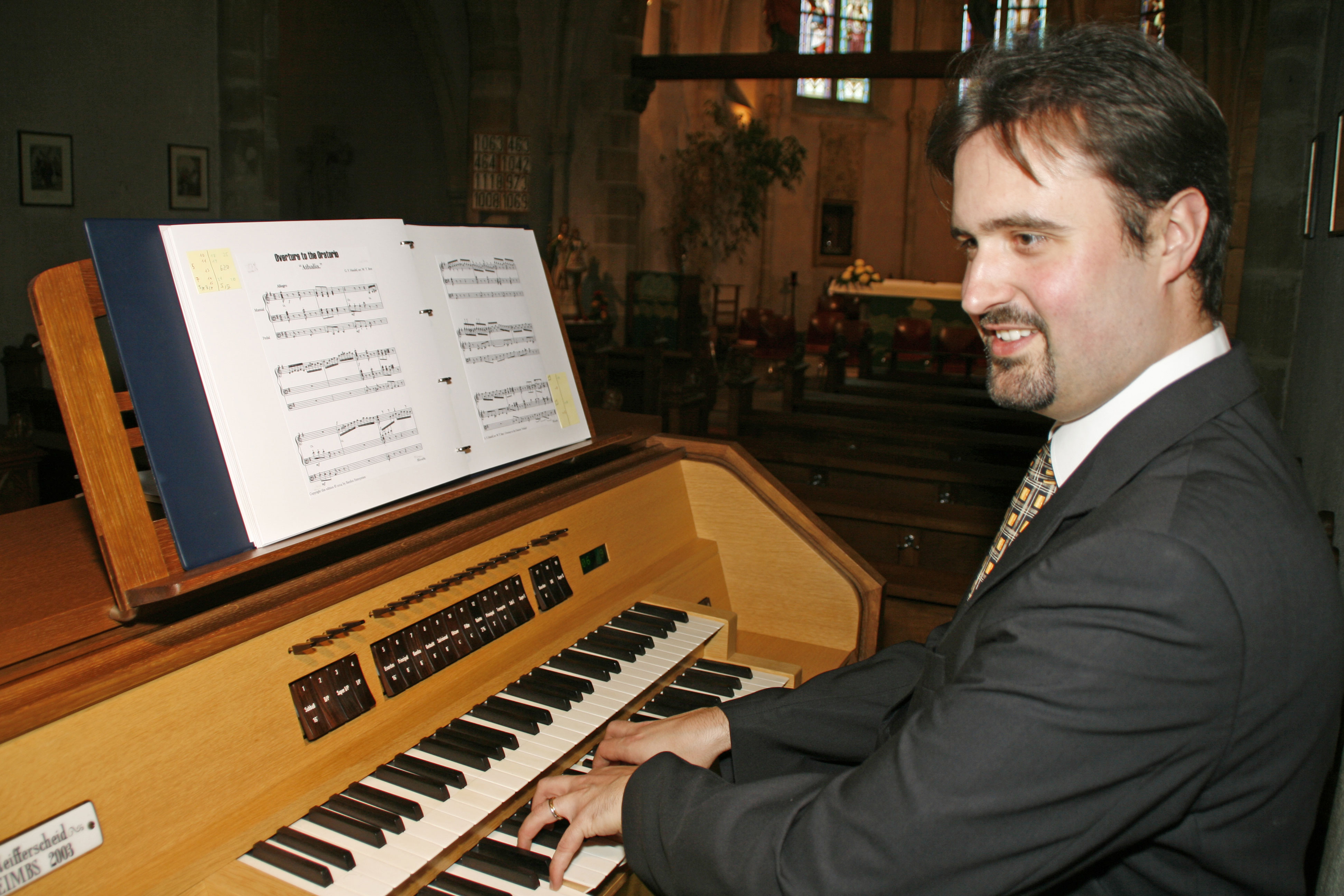 De Laurent Felten .